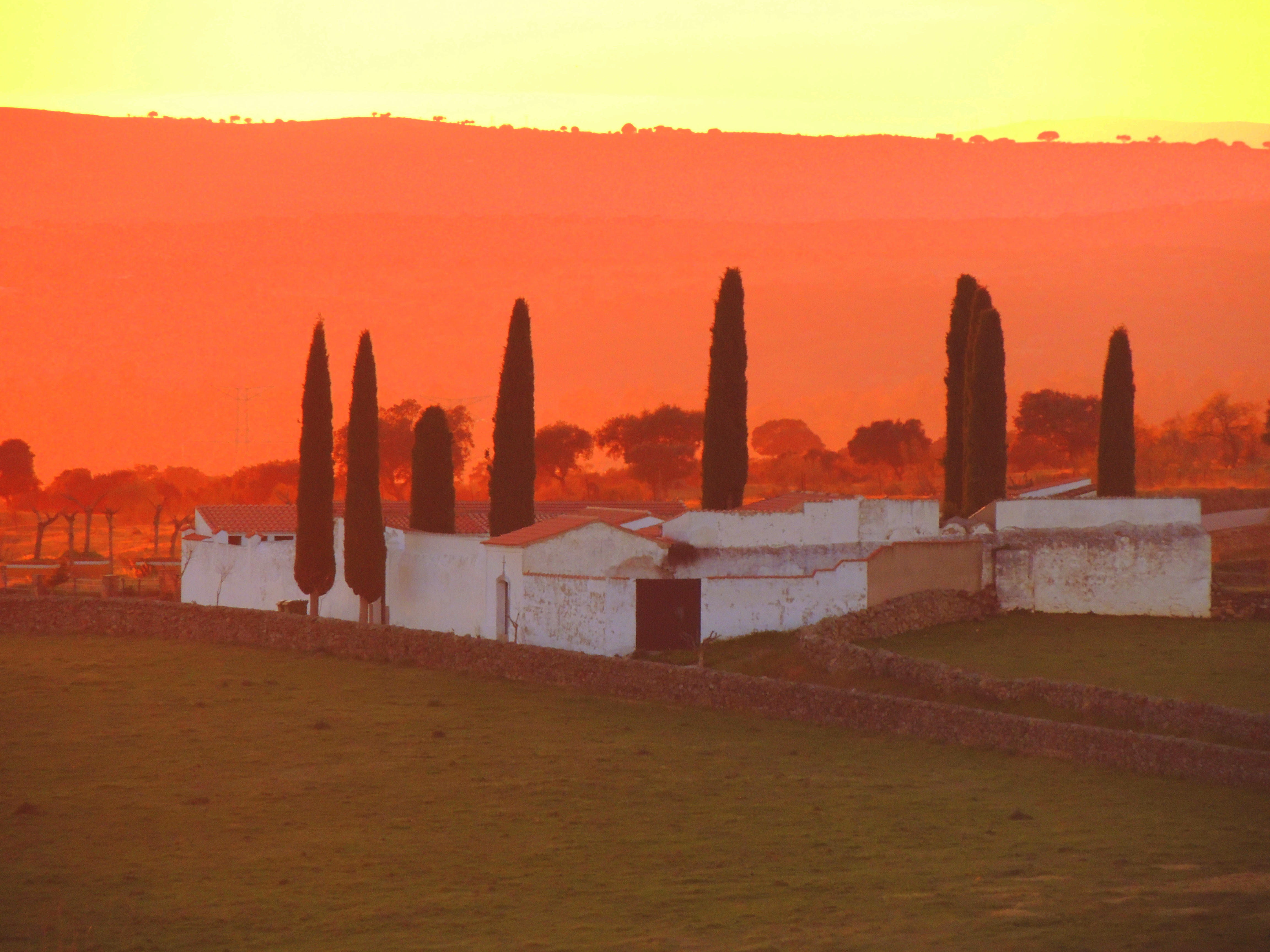 cementerio